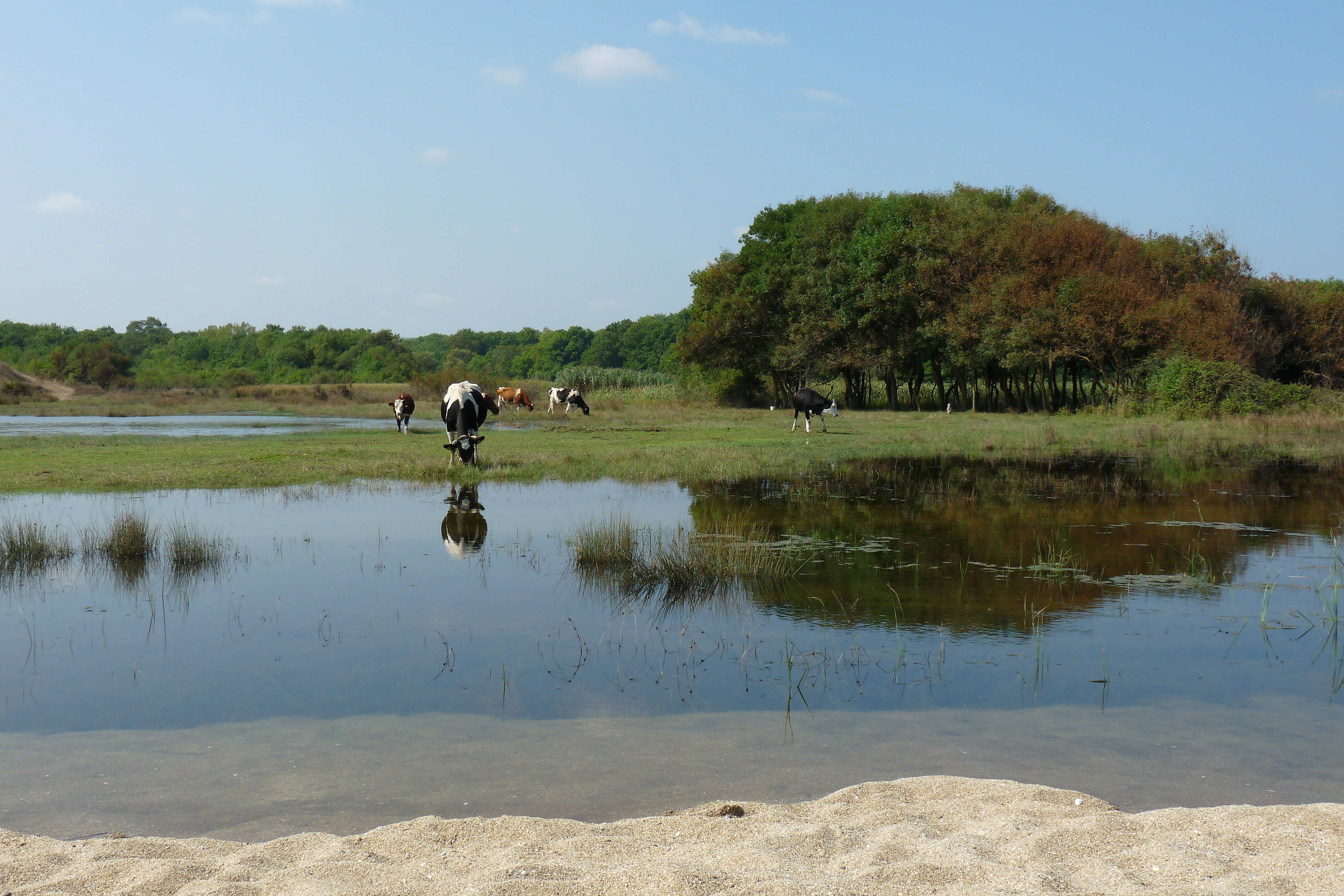 Велека, Крави, пасящи при устието на р. Велека - лято 2011